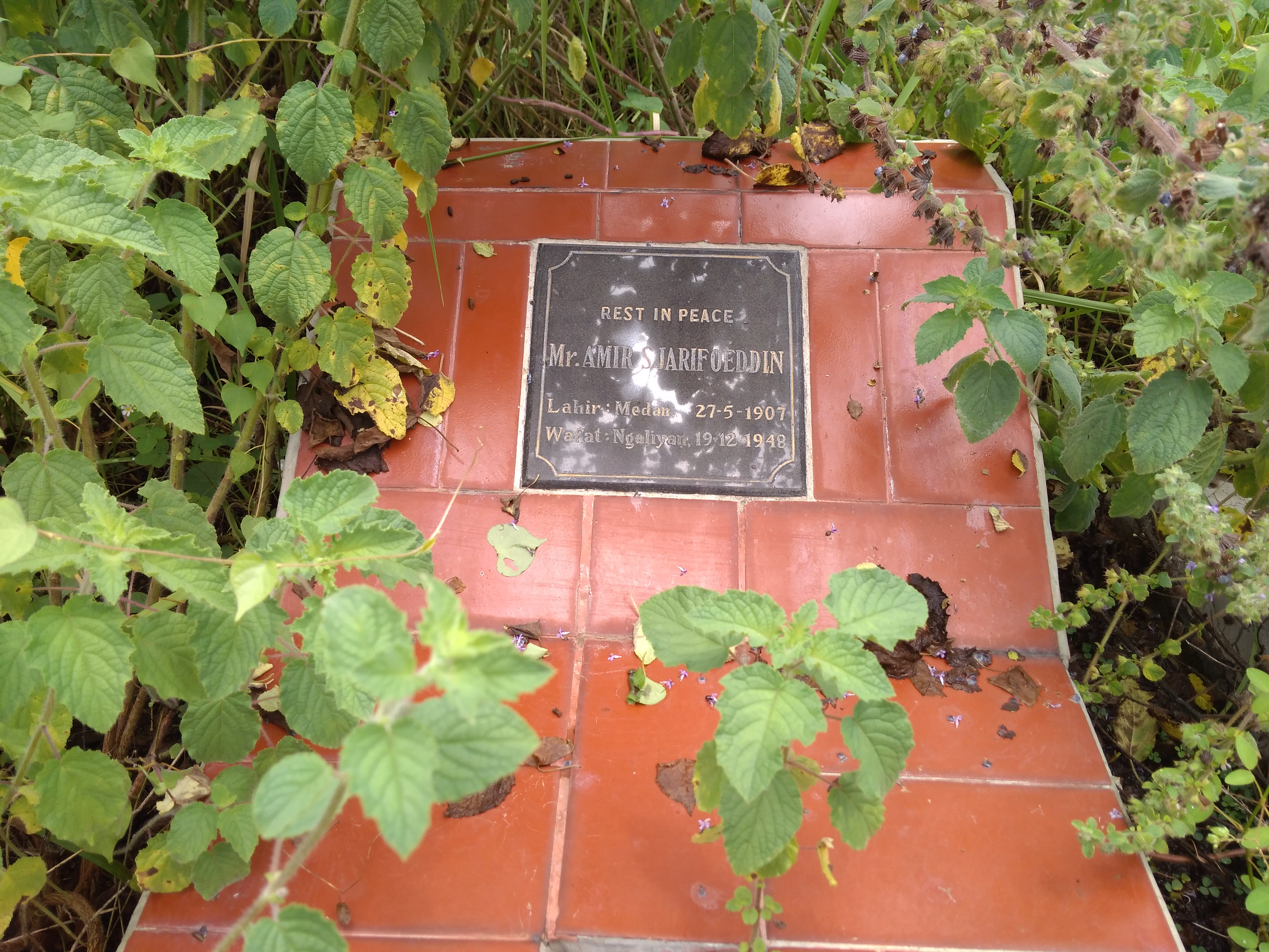 Makam Amir Sjarifoeddin Harahap di TPU Ngaliyan, Kelurahan Lalung, Kecamatan Karanganyar, Kabupaten Karanganyar